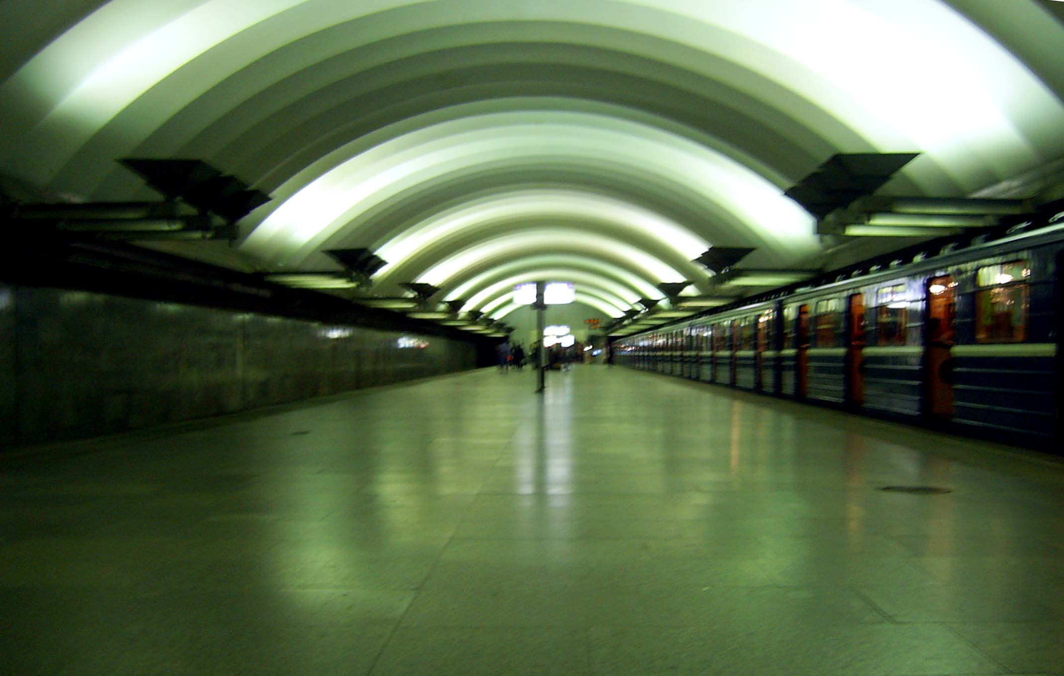 Stanice metra Ploščaď Mužestva v Petrohradu, Rusko